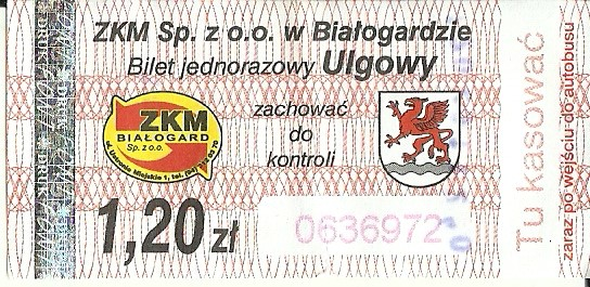 Bilet